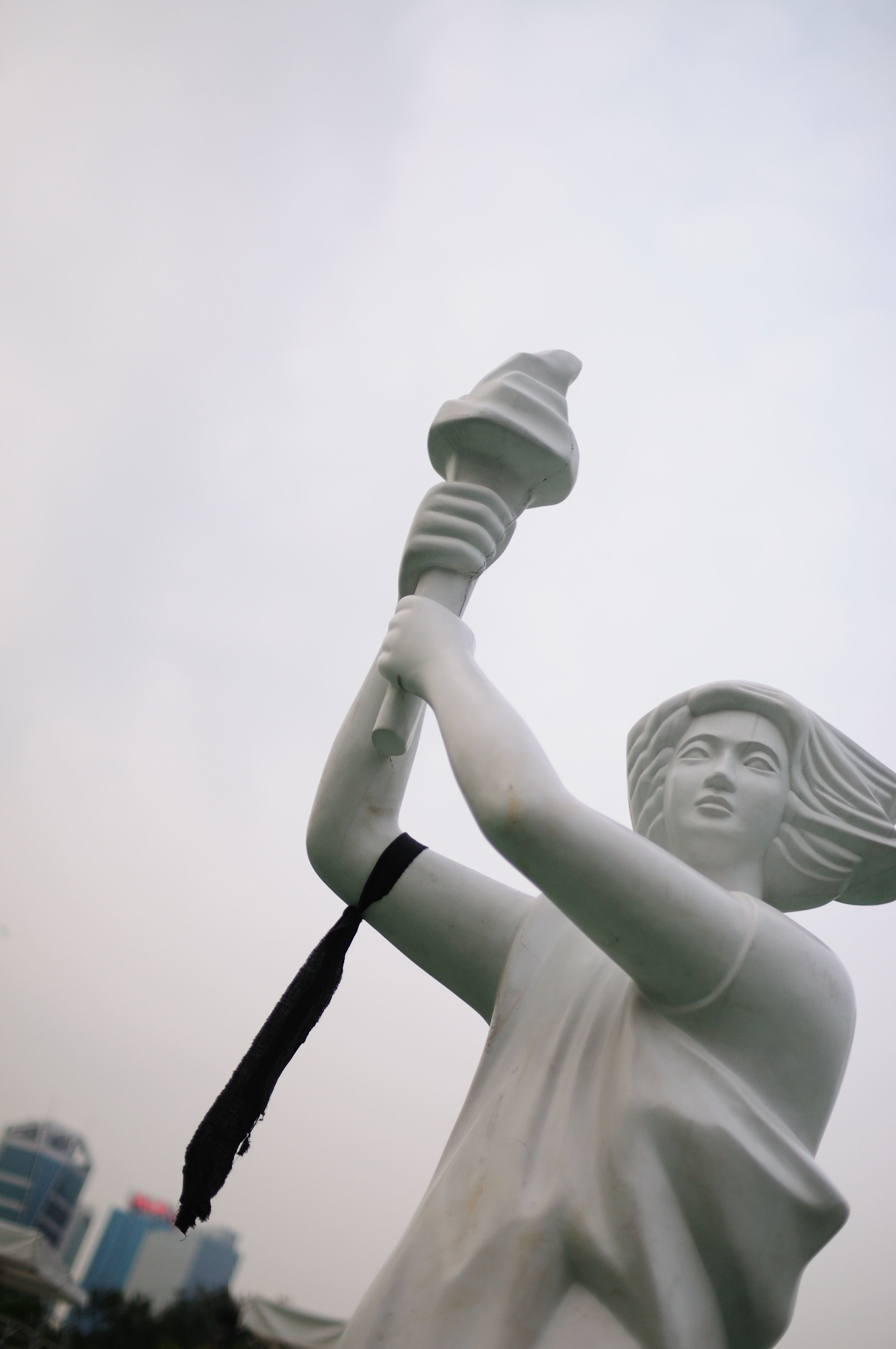 民主女神像